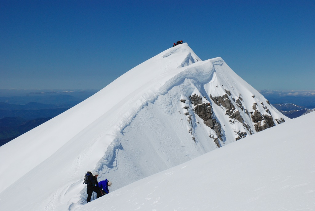 Arista y cima